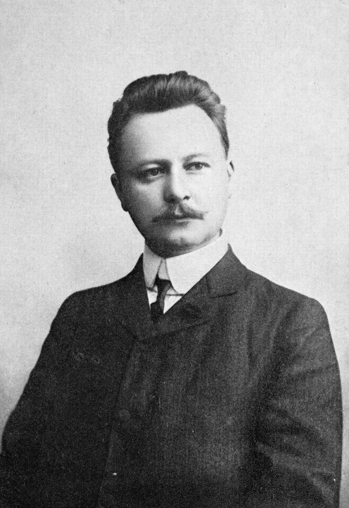 Oscar Stjerne